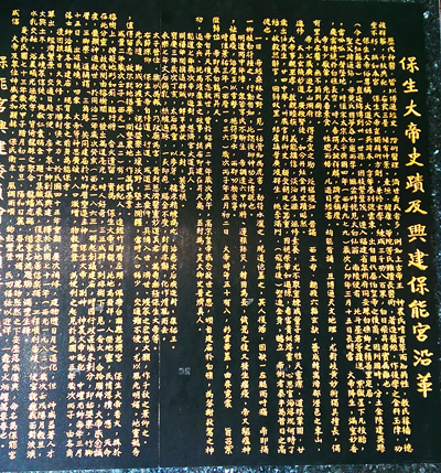 中文（台灣）: 保生大帝史蹟及沿革